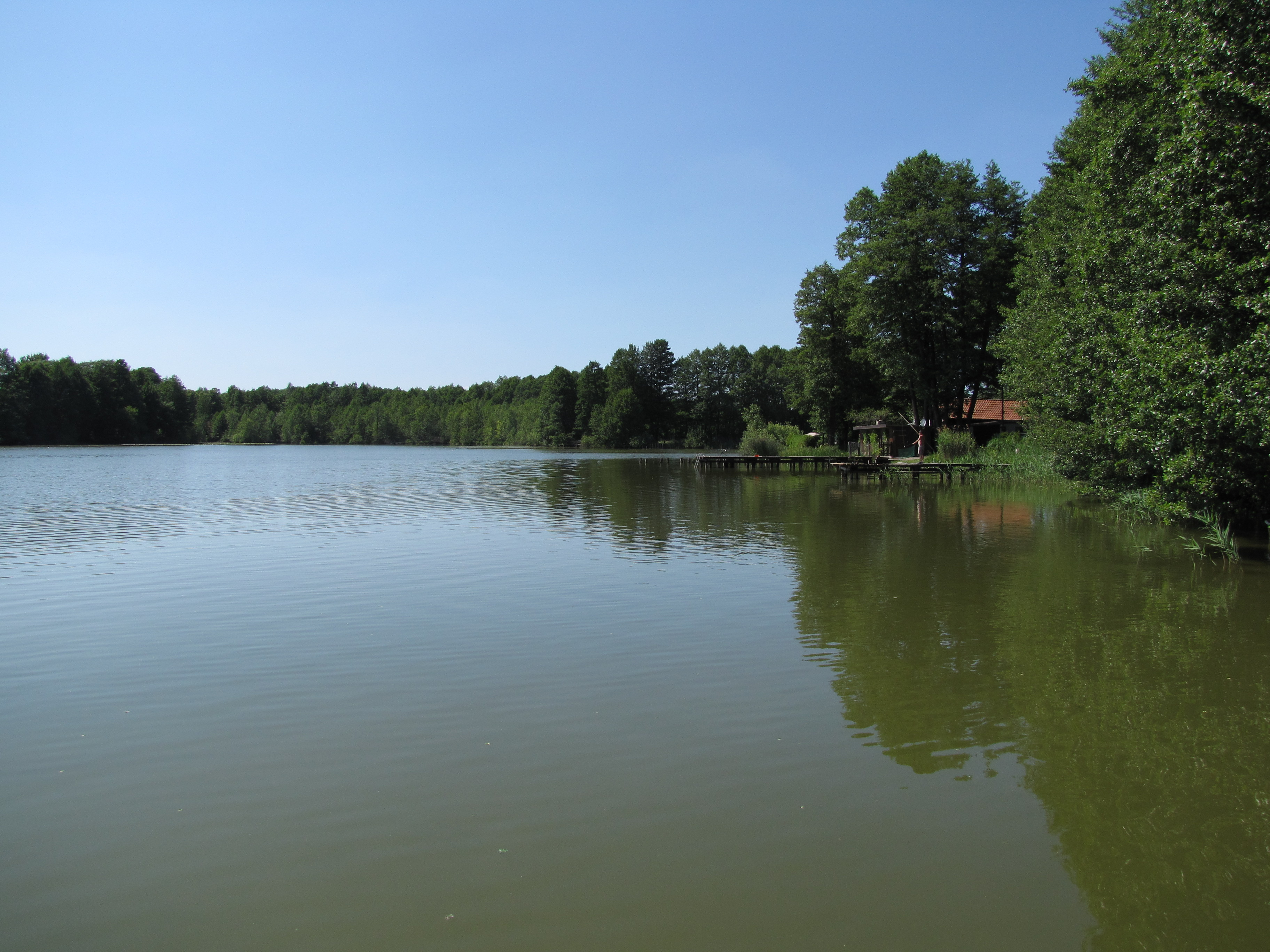 Wolziger See, Blick von Funkenmühle nach Westen, Ortsteil Lindenbrück, Stadt Zossen, Brandenburg, Deutschland